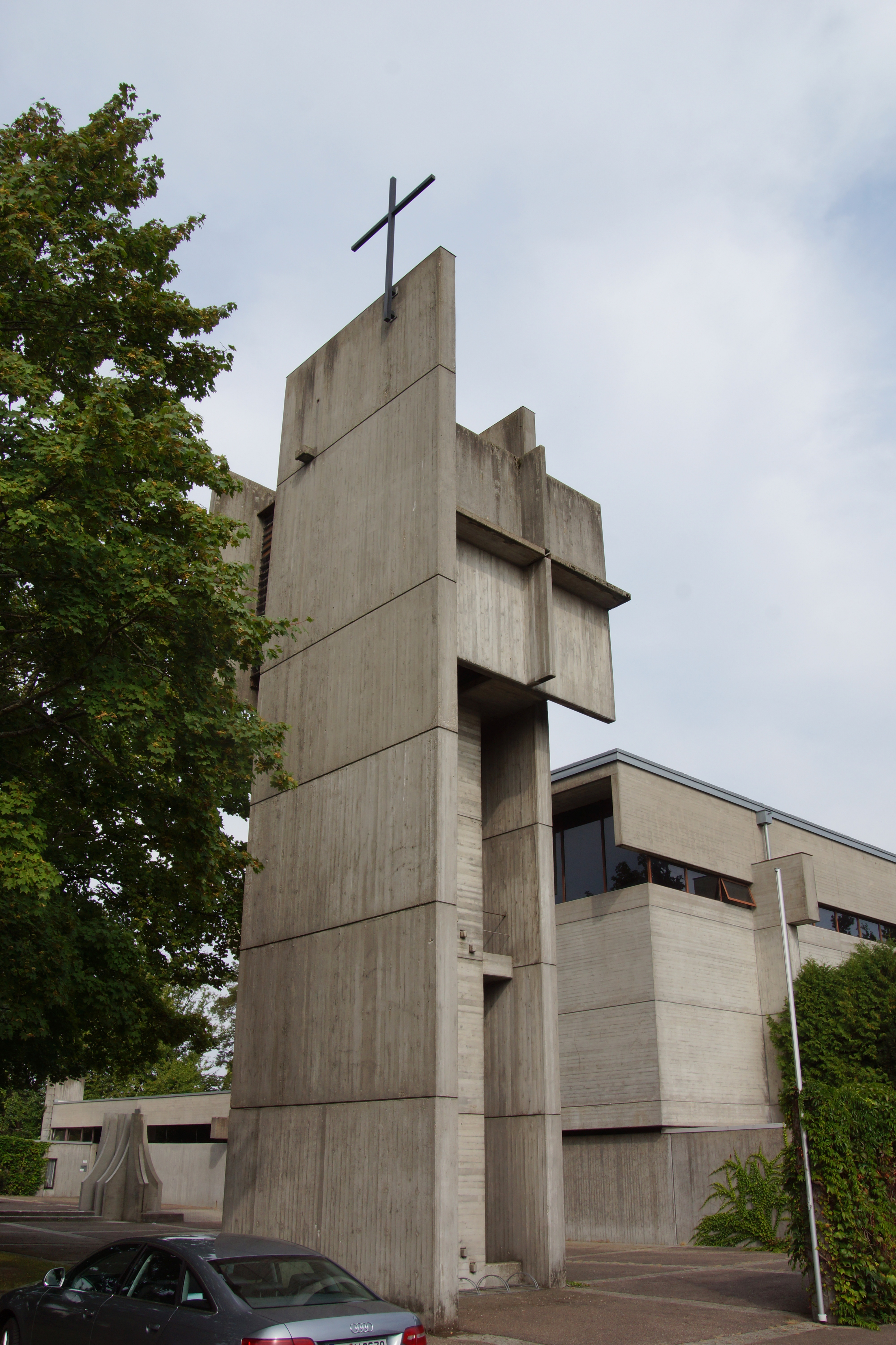 Die Pfarrkirche St Peter in Oberhaunstadt bei Ingolstadt